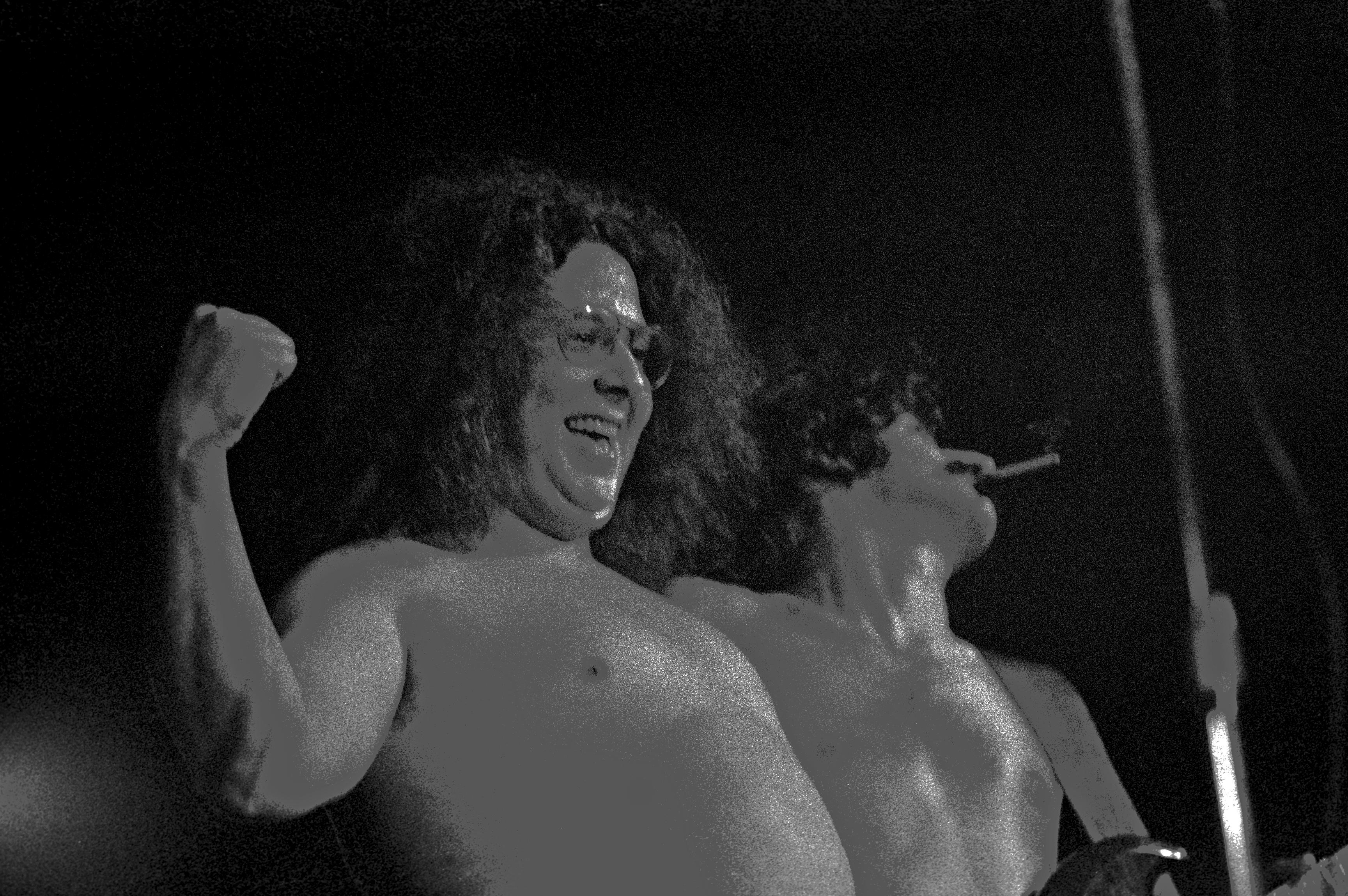 Frank Zappa & The Mothers Of Invention, Dezember 1971, Musikhalle Hamburg: Ex-Turtle Mark Volman und Zappa